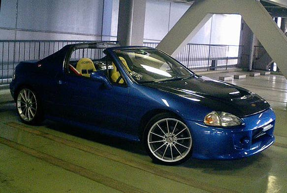 JDM honda del sol